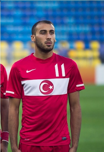 Cenk Tosun, Türkiye A2 Milli Takımı formasıyla.